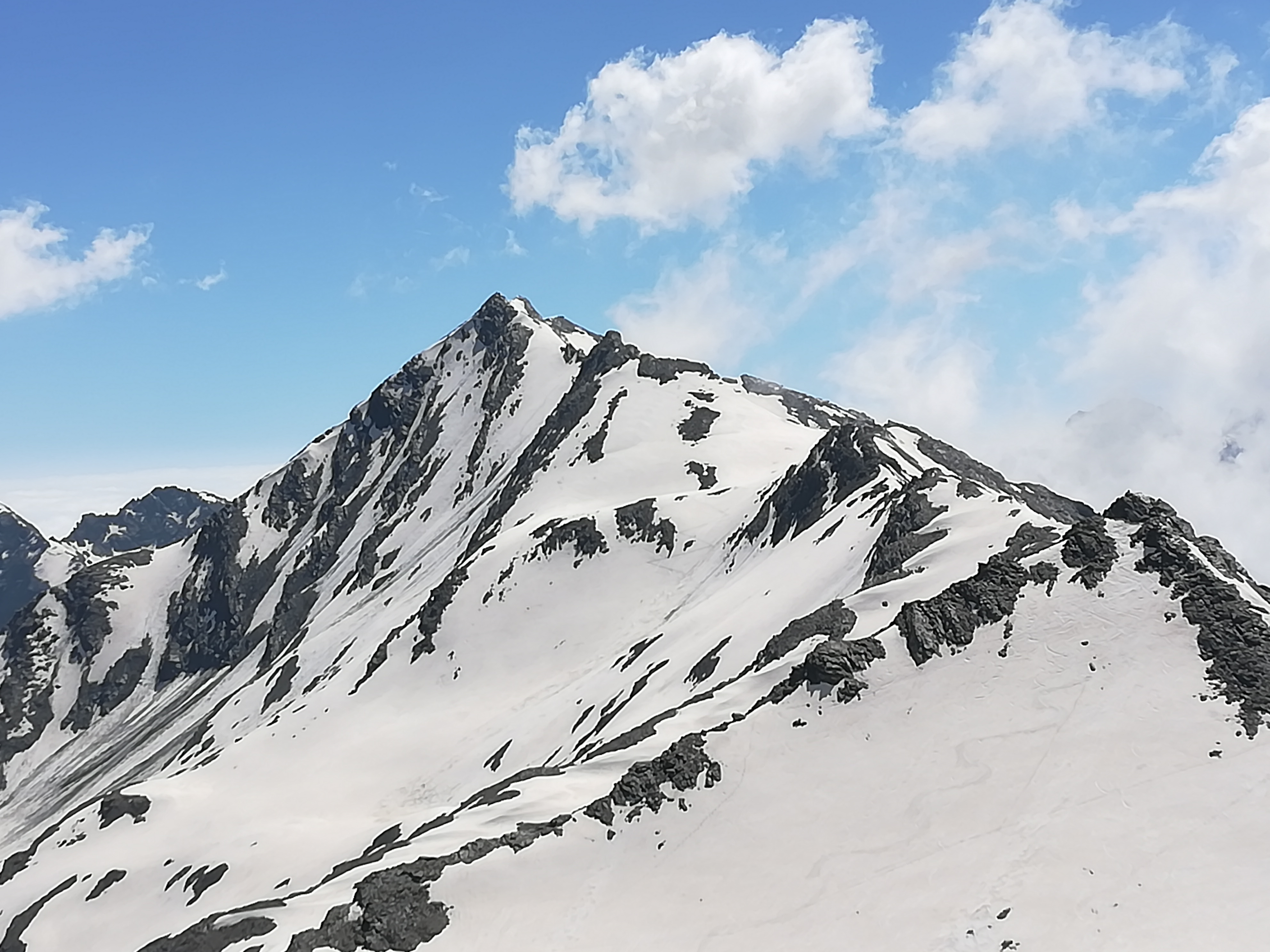 La montagna vista dal confine tra Italia e Francia tra il Pan di Zucchero ed il Pic d'Asti